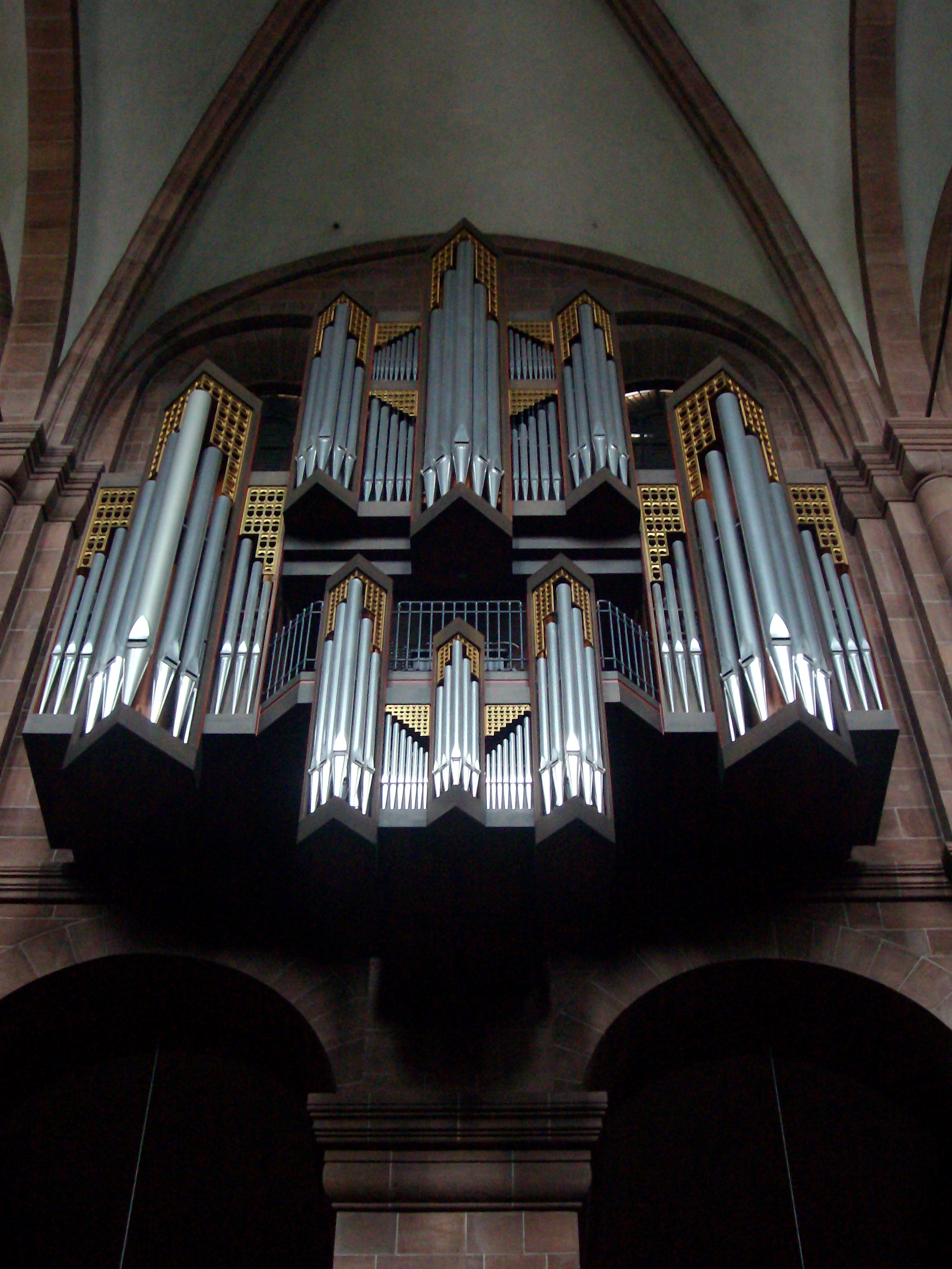 Hauptorgel im Wormser Dom